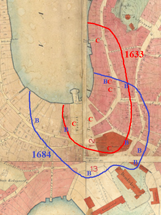 Ustrekningen av bybrannene i Stavanger i 1633 og 1684.